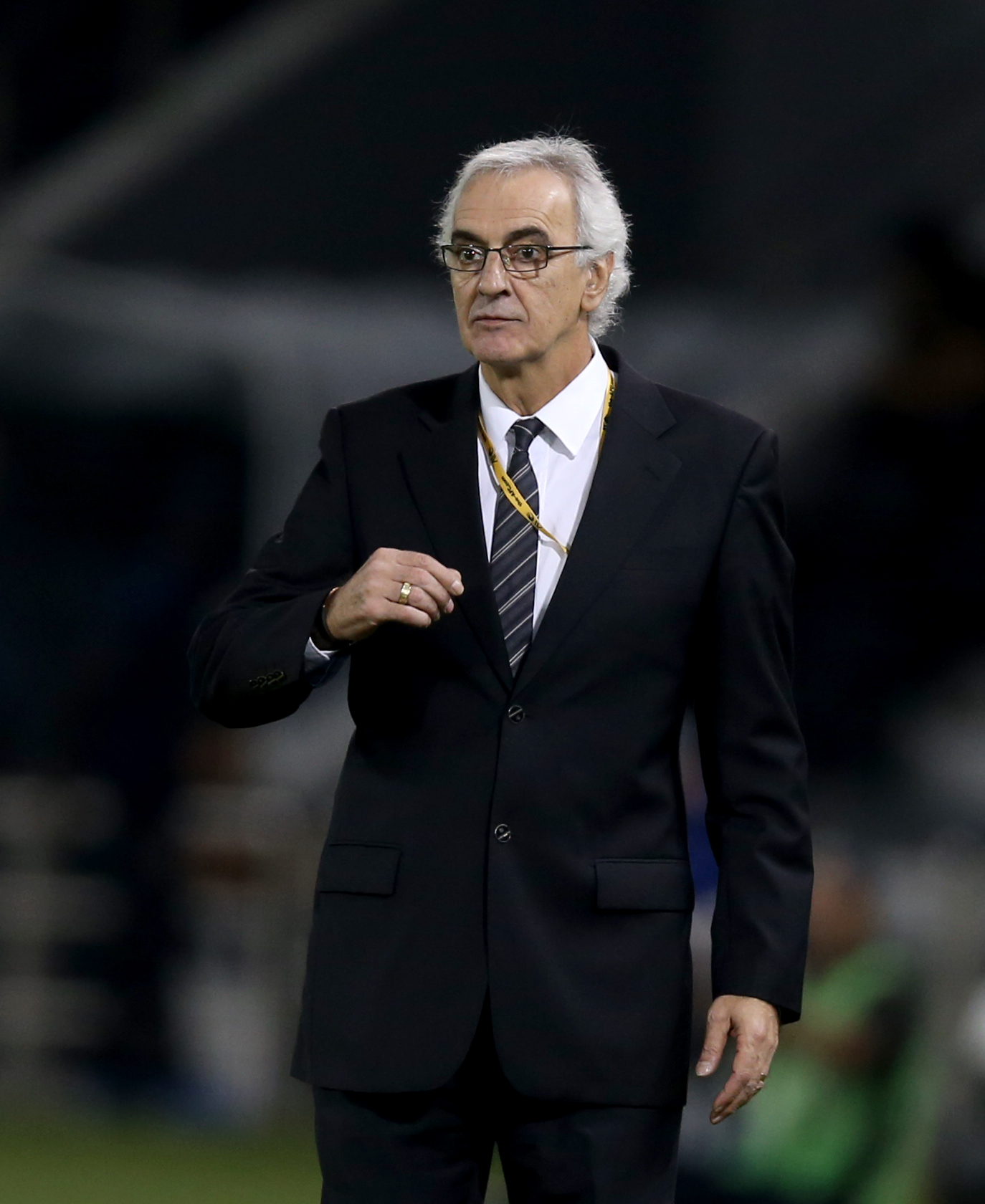 Хорхе Фоссати